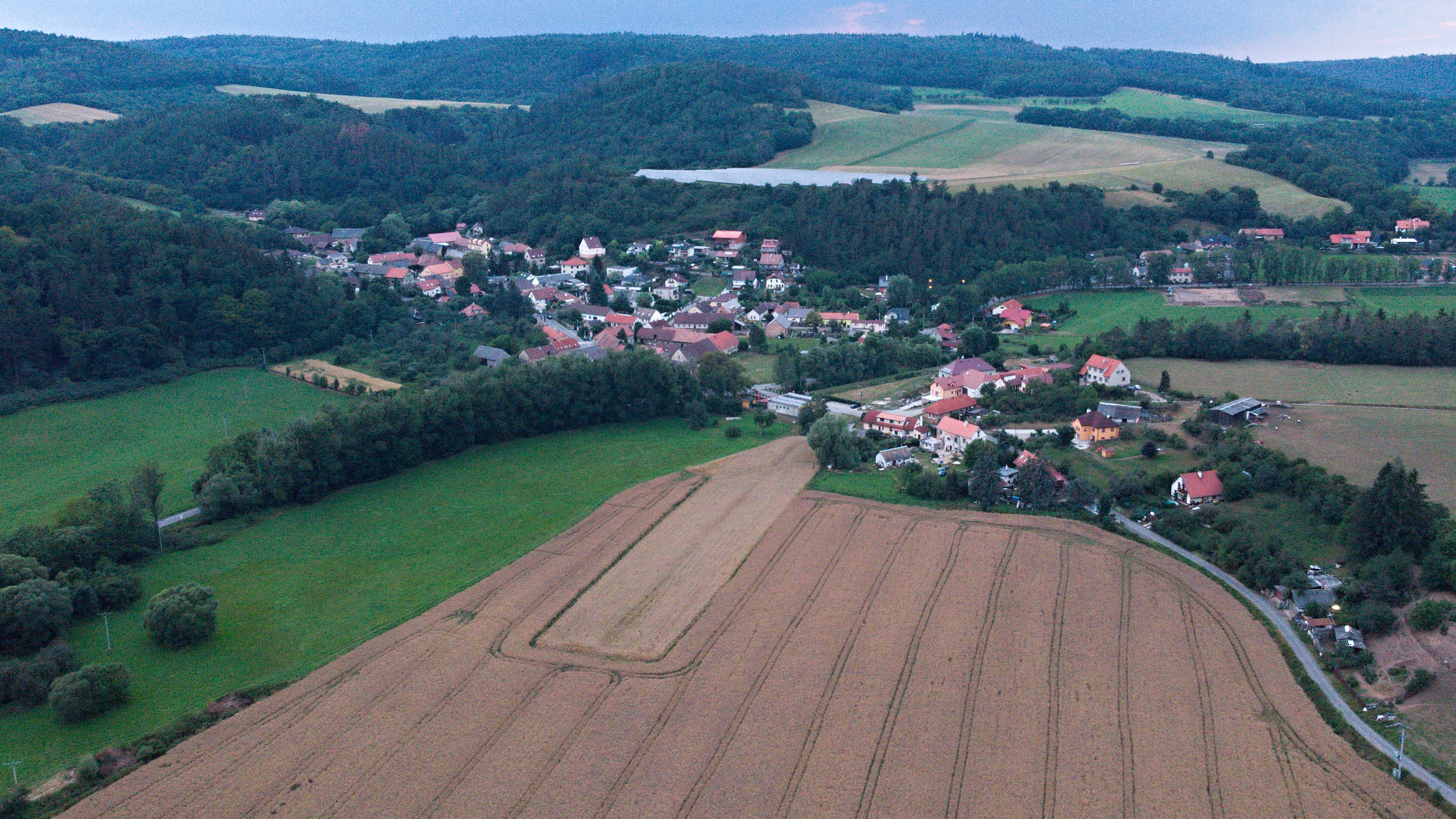 Nenačovice, letecký snímek z jihu